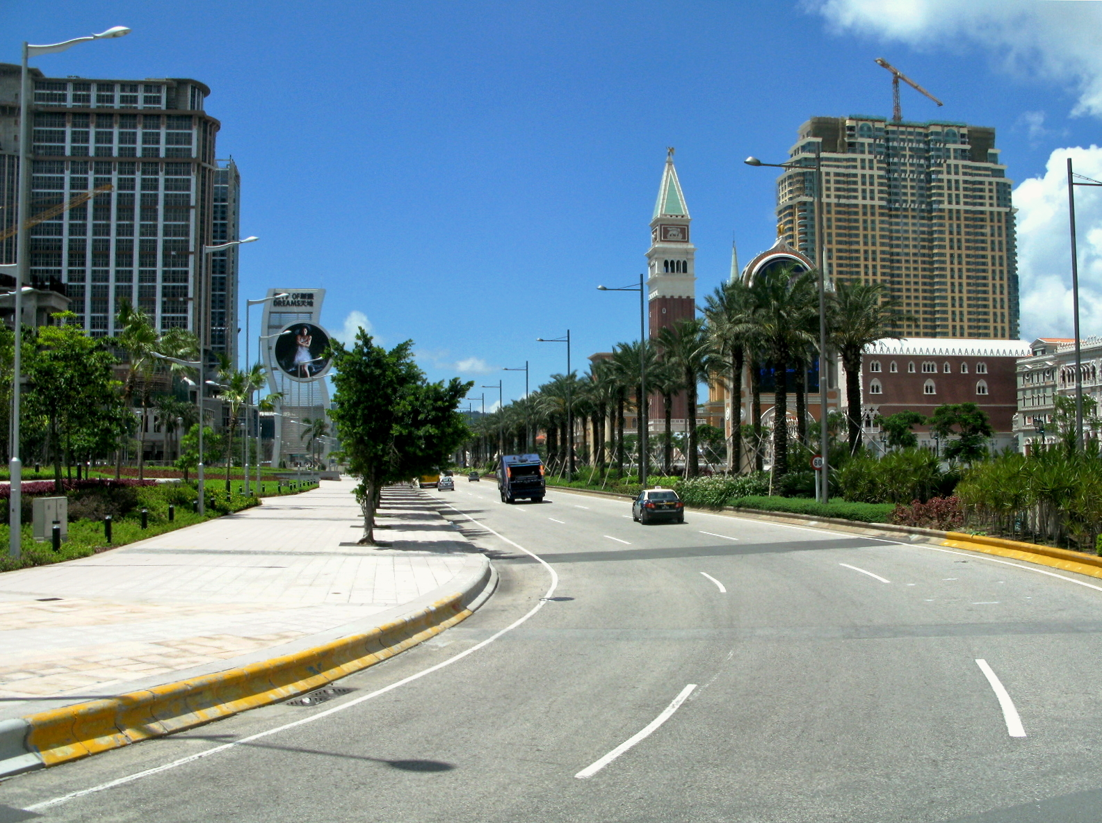 Macao Cotai Strip 路氹金光大道